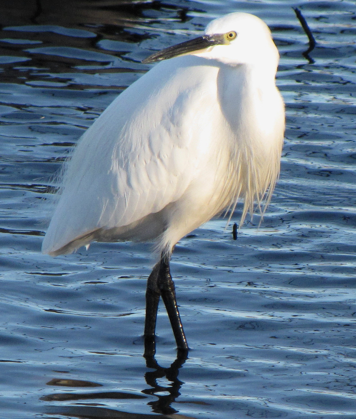 Egretta garzetta Little egret